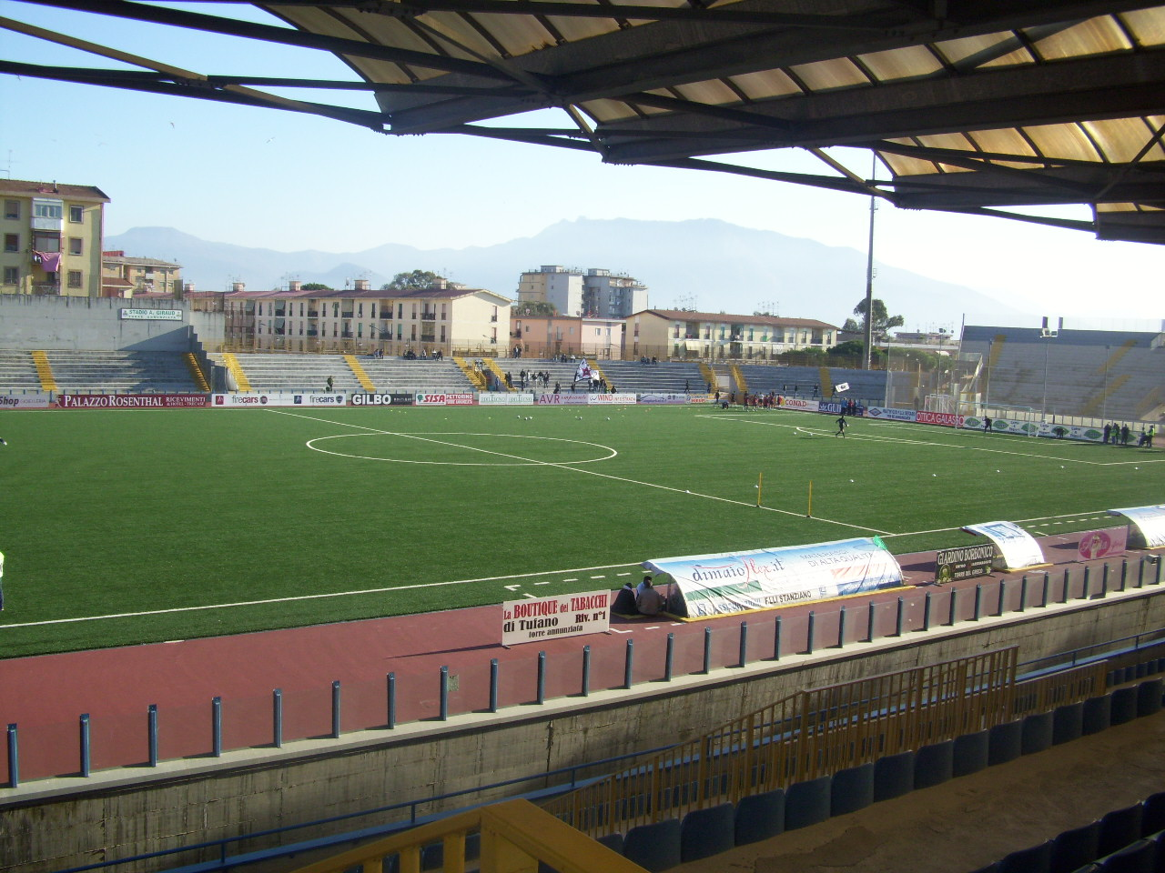 Lo stadio Giraud visto dalla tribuna